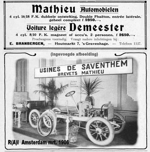 Mathieu (B) - E. Branbergen, 's Gravenhage, 1906 advertentie juli 1906